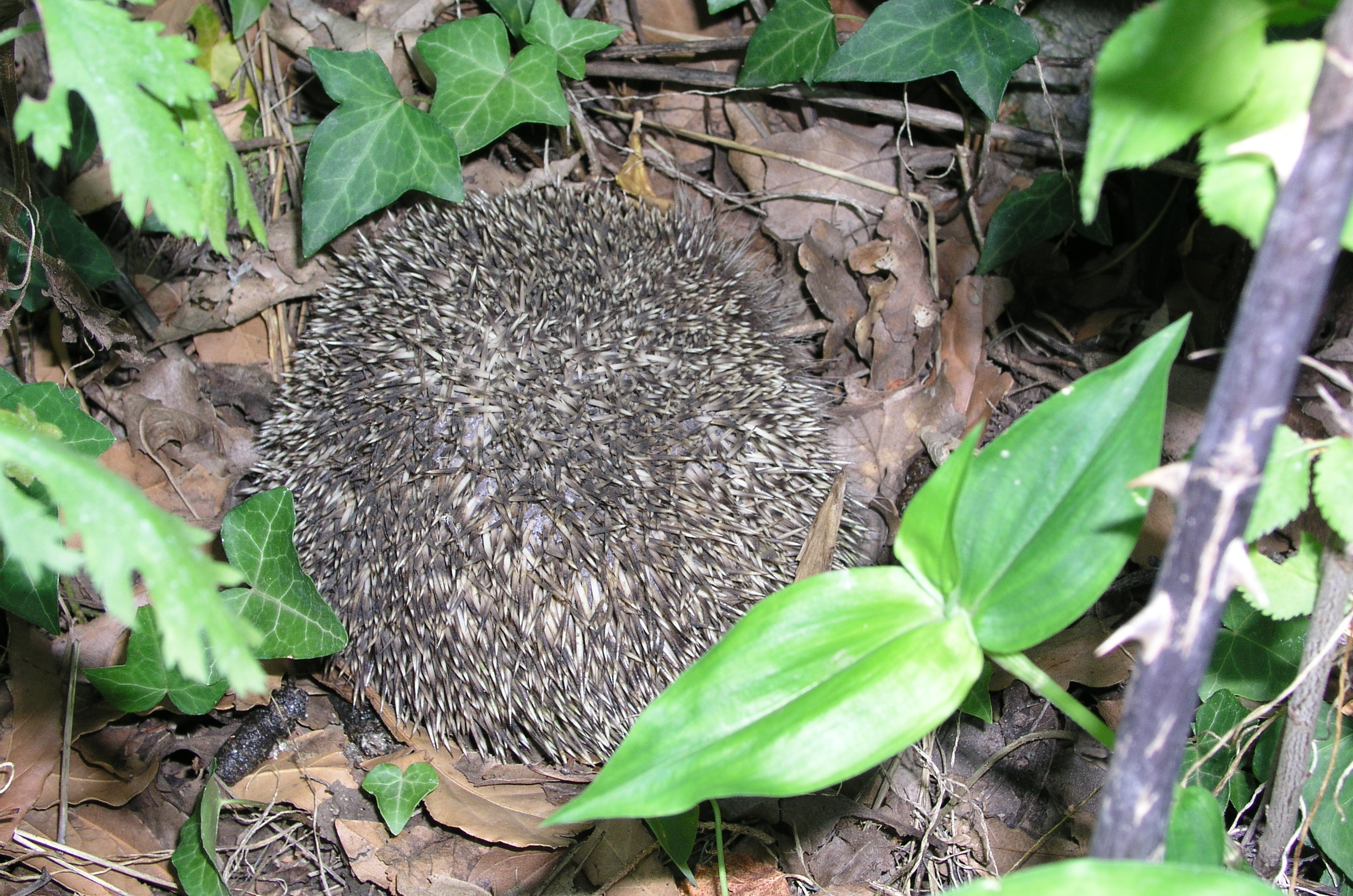 Tamnoprsi jež (Erinaceus europaeus)